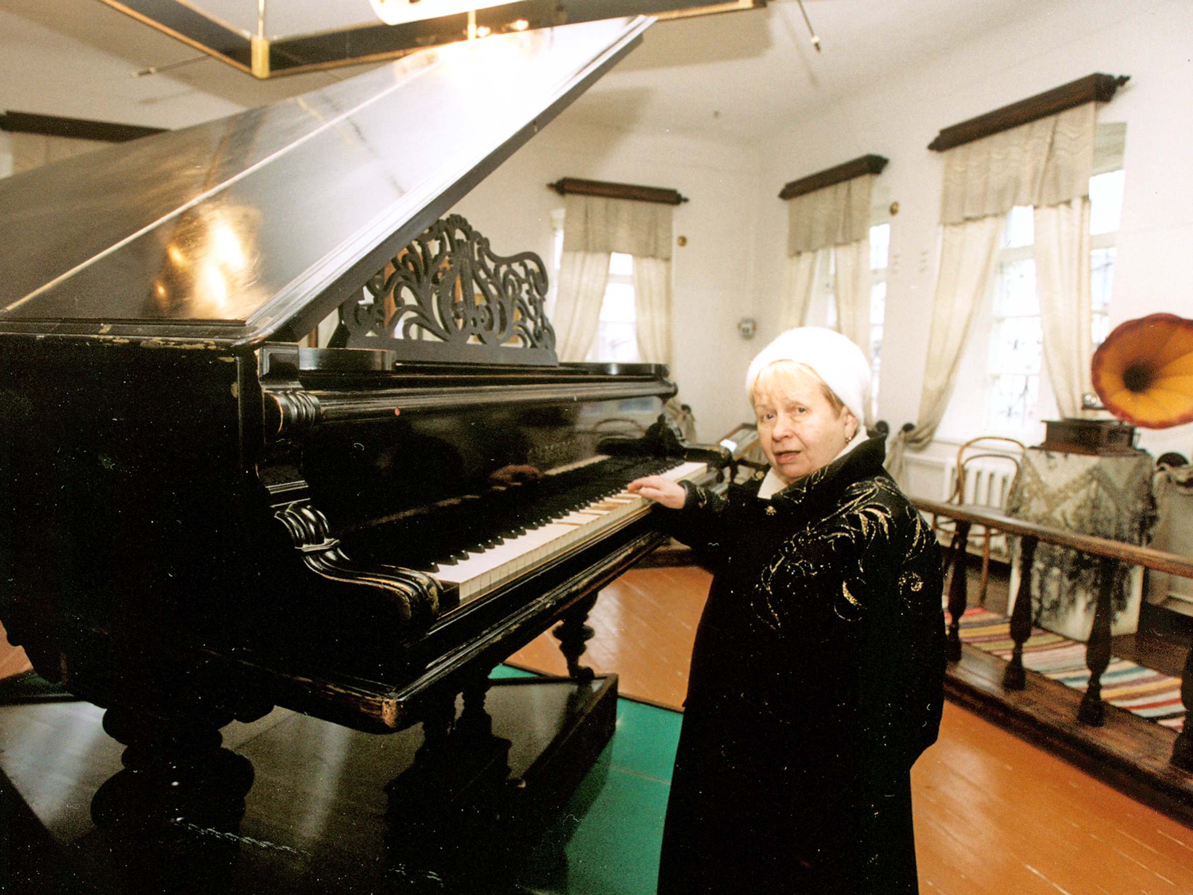 Пахмутова у рояля на котором учился играть С Прокофьев в с Красное